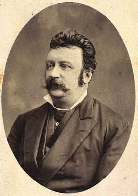 Adolph Berndt Hellesen (1831-1890), Danish painter